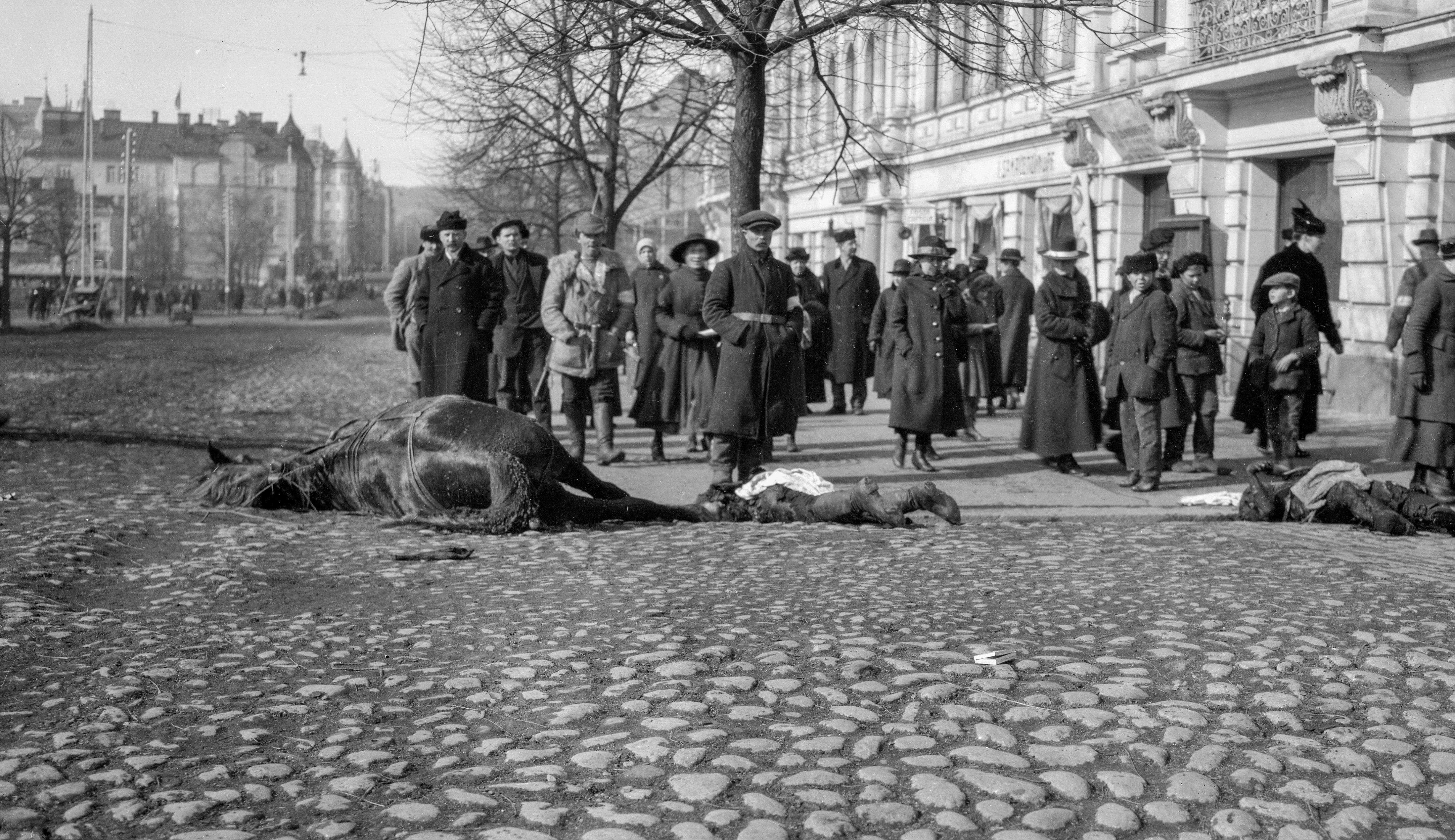 Kuvattu Hämeenkadun ja Pellavatehtaankadun kulmauksessa. Taustalla on Ruuskasen talo. CC-BY Tampere 1918, kuvaaja Oscar Sundberg, Vapriikin kuva-arkisto. Finnish Civil War 1918, Photographer Oscar Sundberg, Vapriikki Photo Archives.